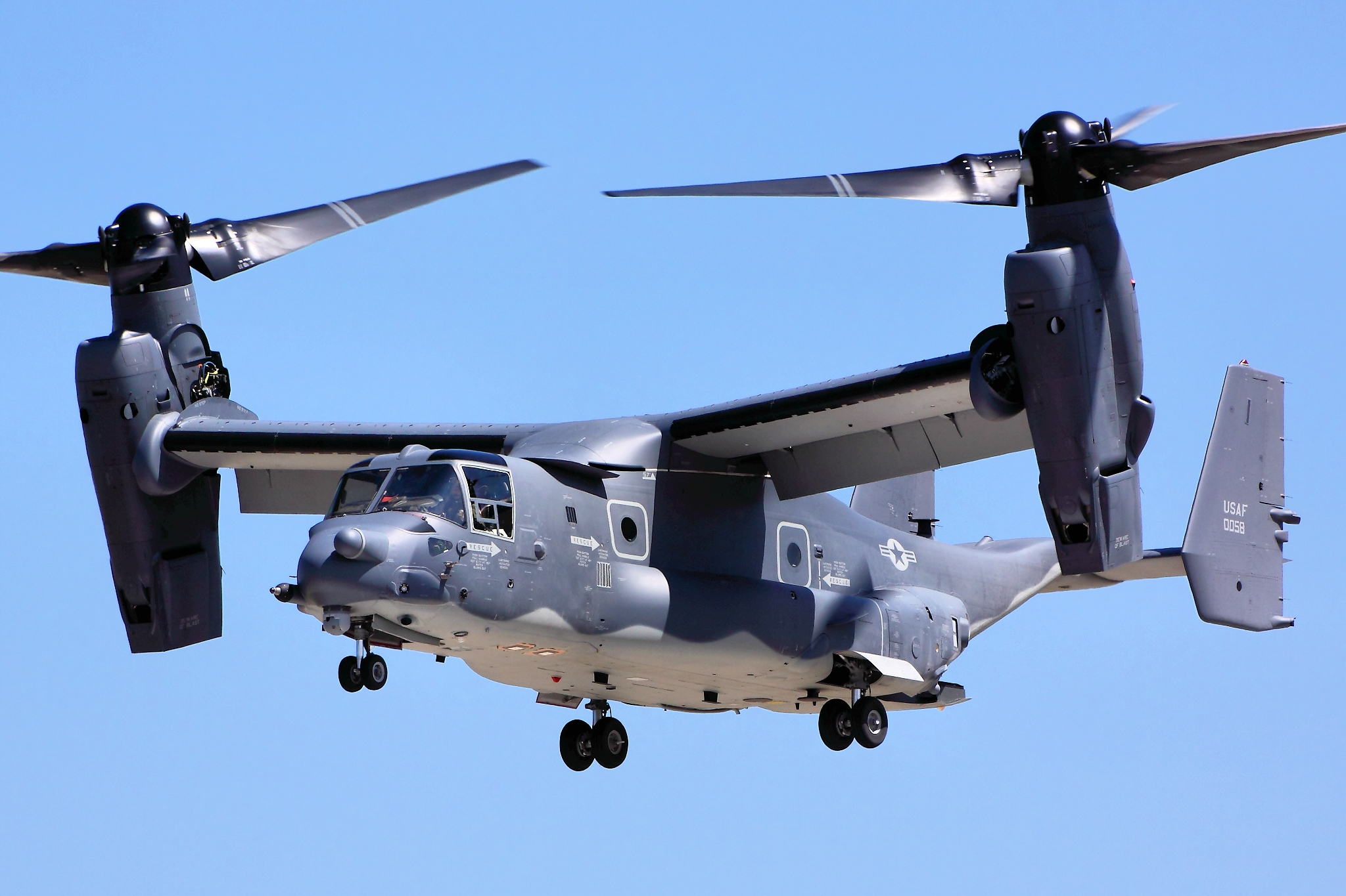 CV-22B Osprey - RAF Mildenhall